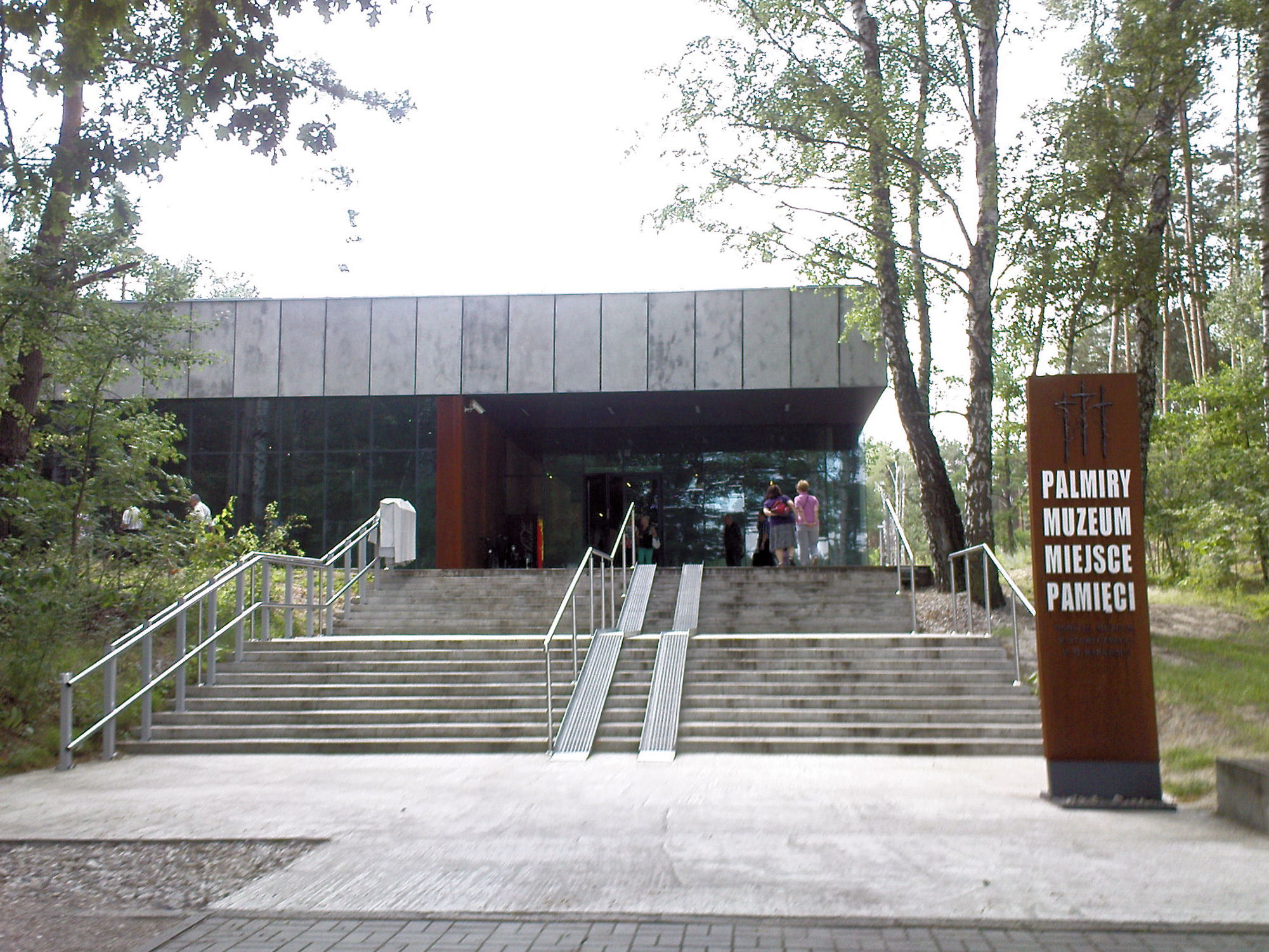 Muzeum wraz z cmentarzem w Palmirach miejscem pamięci narodowej